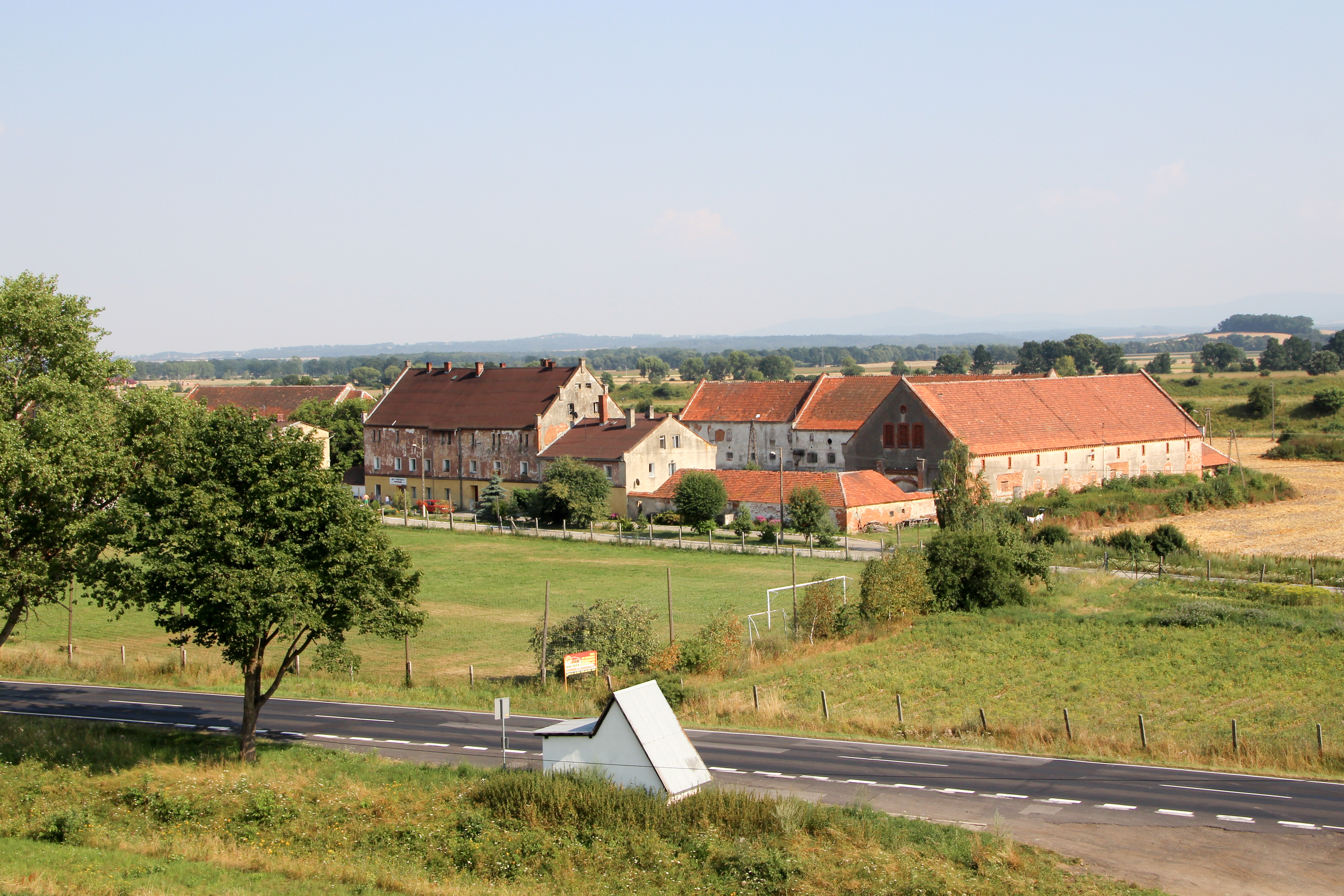 Frydrychów – wieś w Polsce, w województwie opolskim, w powiecie nyskim, w gminie Paczków.